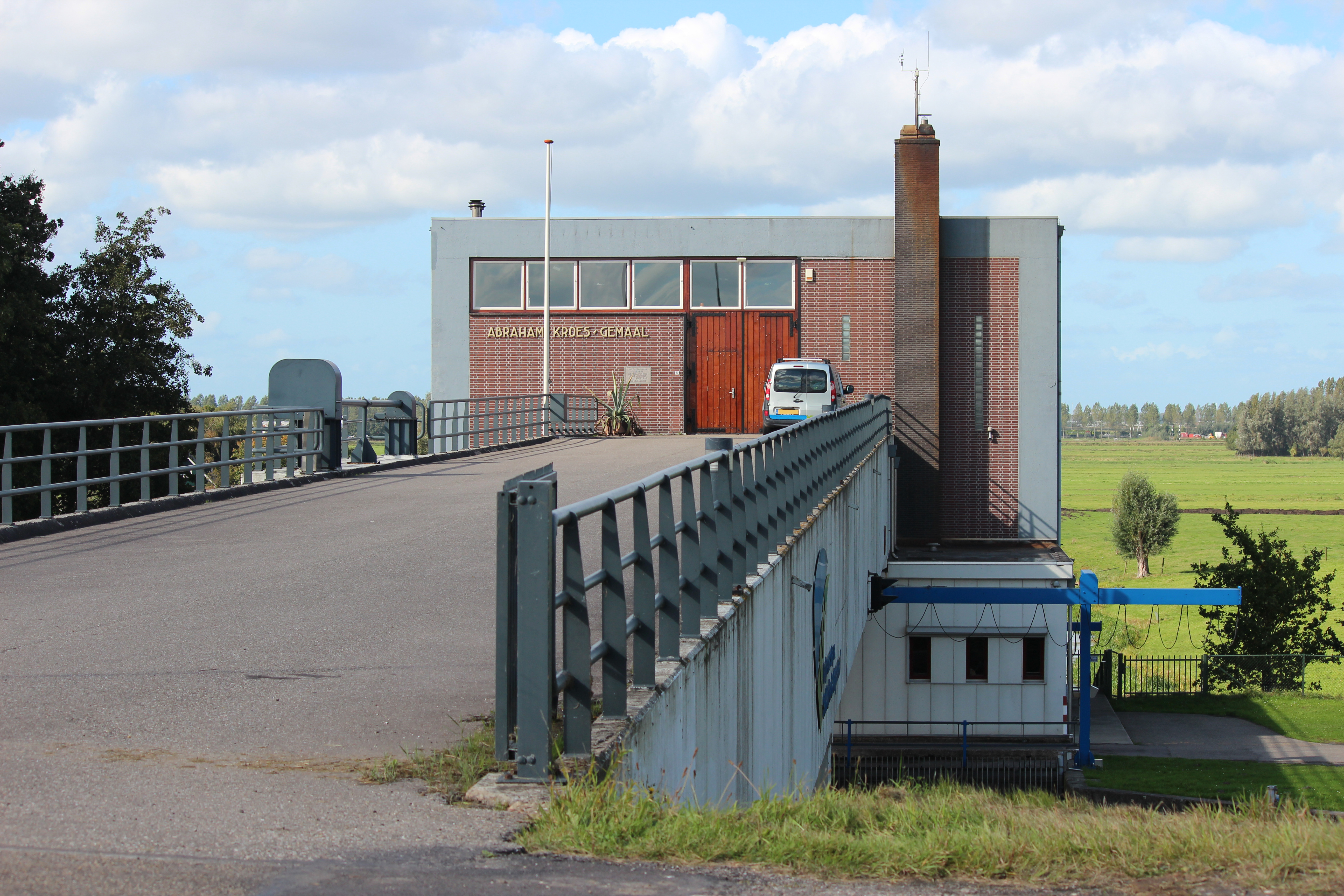 Overzicht van Abraham Kroes gemaal vanaf de dijk.